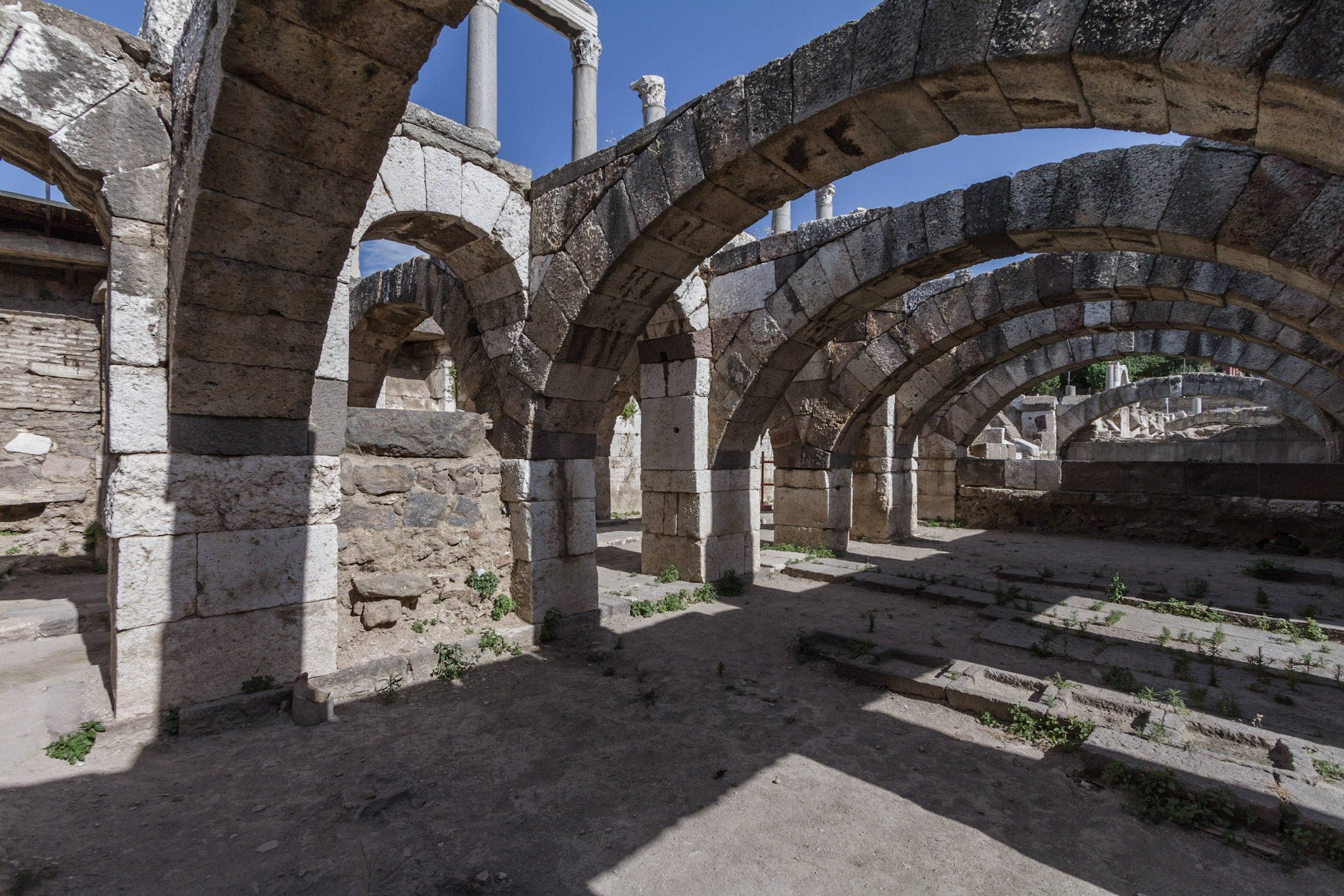 Izmir Agora Archs